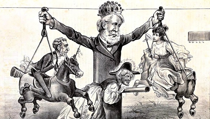 O rei se diverte”, charge de Faria